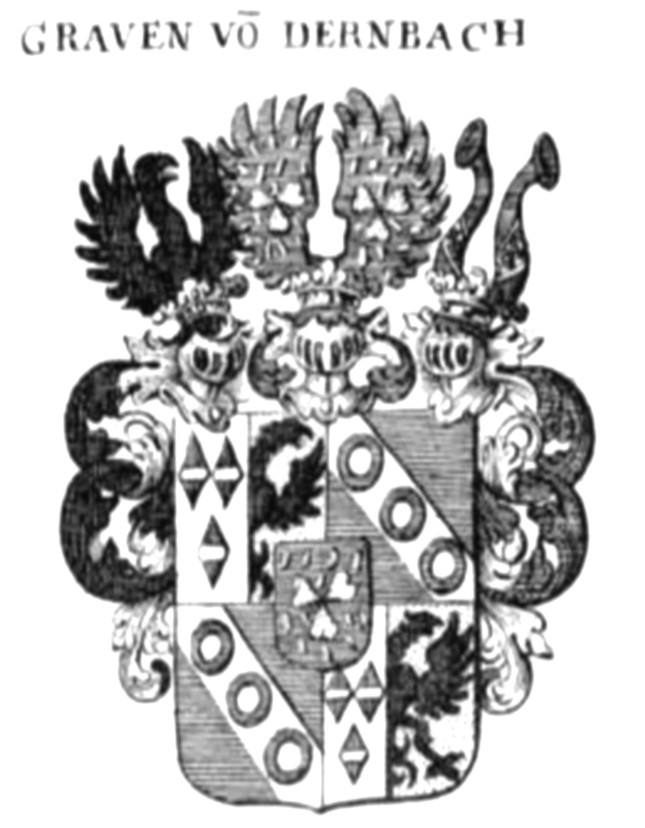 Wappen der Grafen von Dernbach, (Ausschnitt)